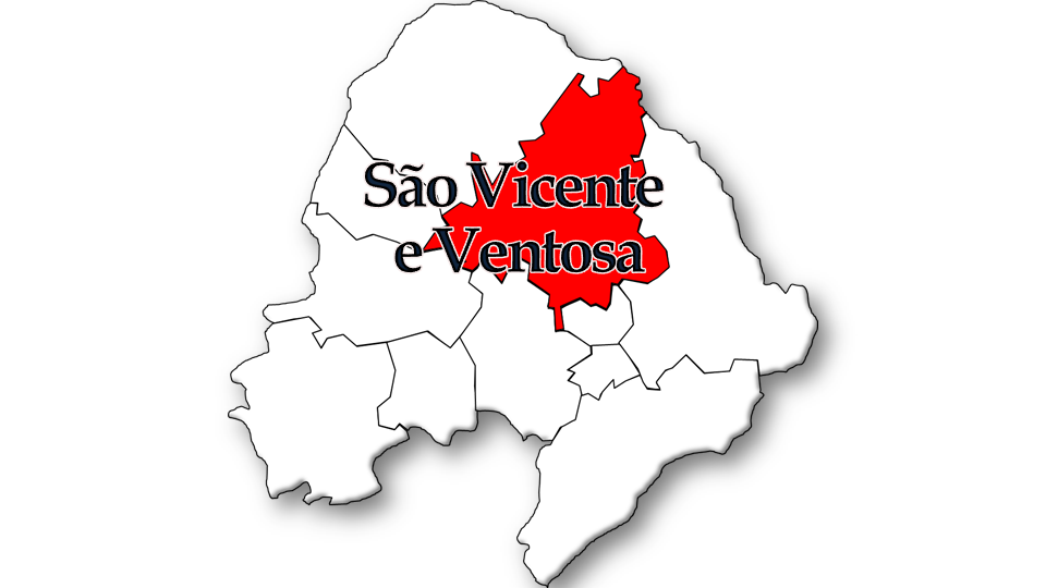 Evolução da População